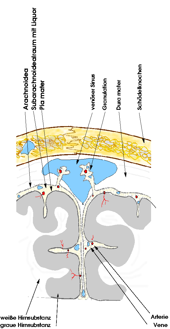 Skizze des Subarachnoidealraumes Zeichner: Thormann Andere Versionen: keine Hirnhaut.png